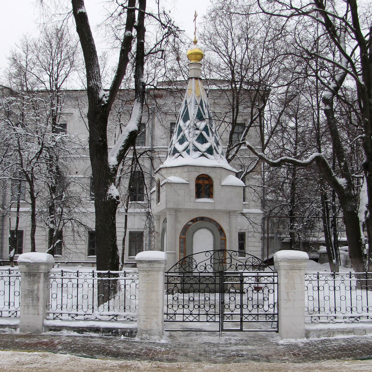 Часовня в честь Фёдора Ушакова напротив здания Мариинского института благородных девиц, ныне 3-го корпуса НГТУ им. Алексеева